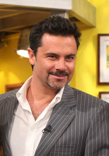 El presentador Felipe Camiroaga en 2009, en un episodio de Buenos días a todos